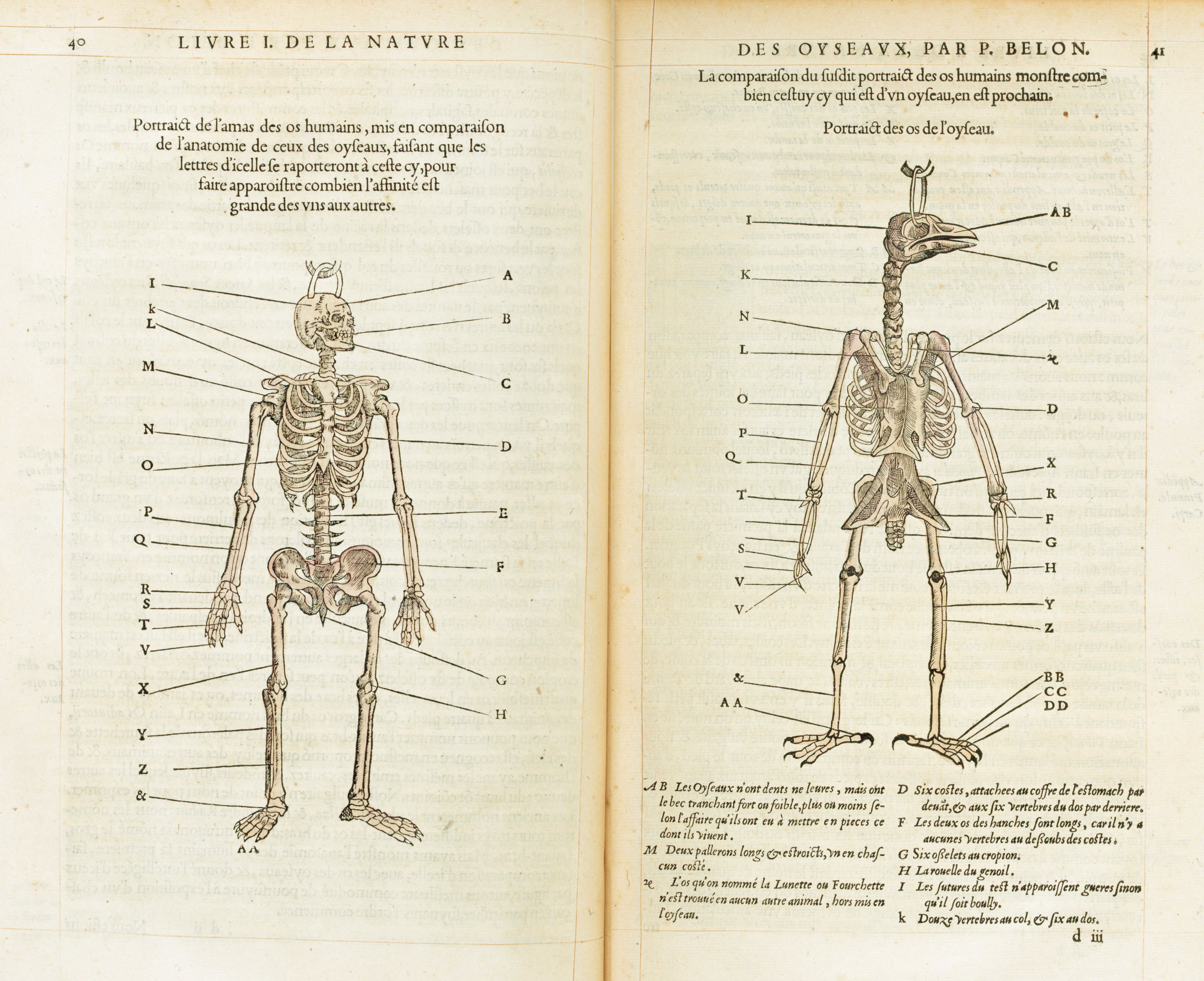 Squelette d'oiseau et d'être humain (premier exemple d'anatomie comparée).